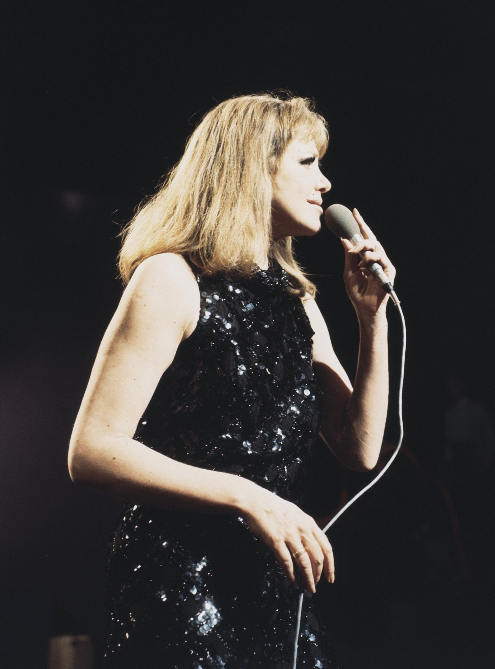 Duitse zangeres Hildegard Knef maakt TV opnamen; Hildegard Knef met microfoon